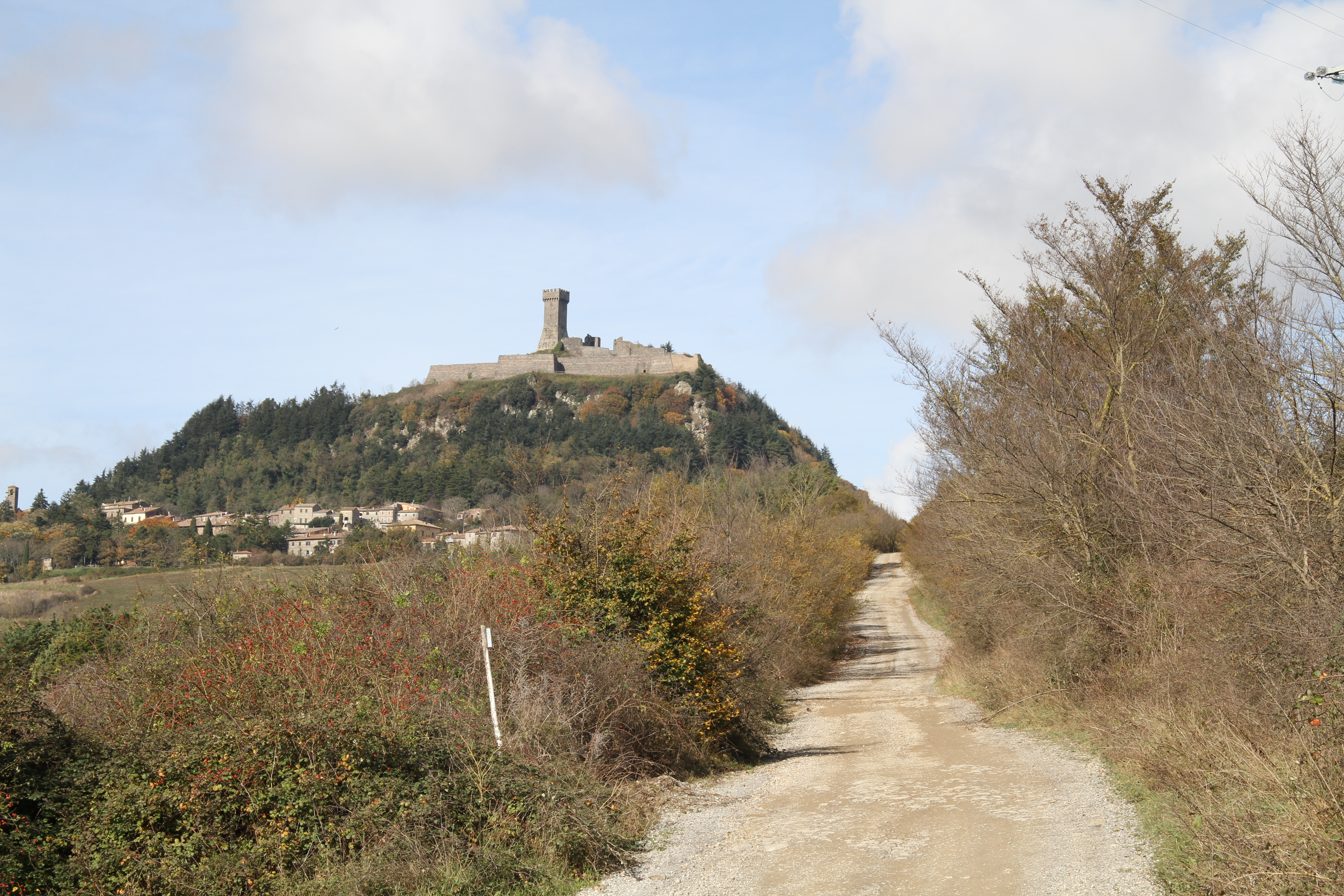 Radicofani desde la Via Francigena